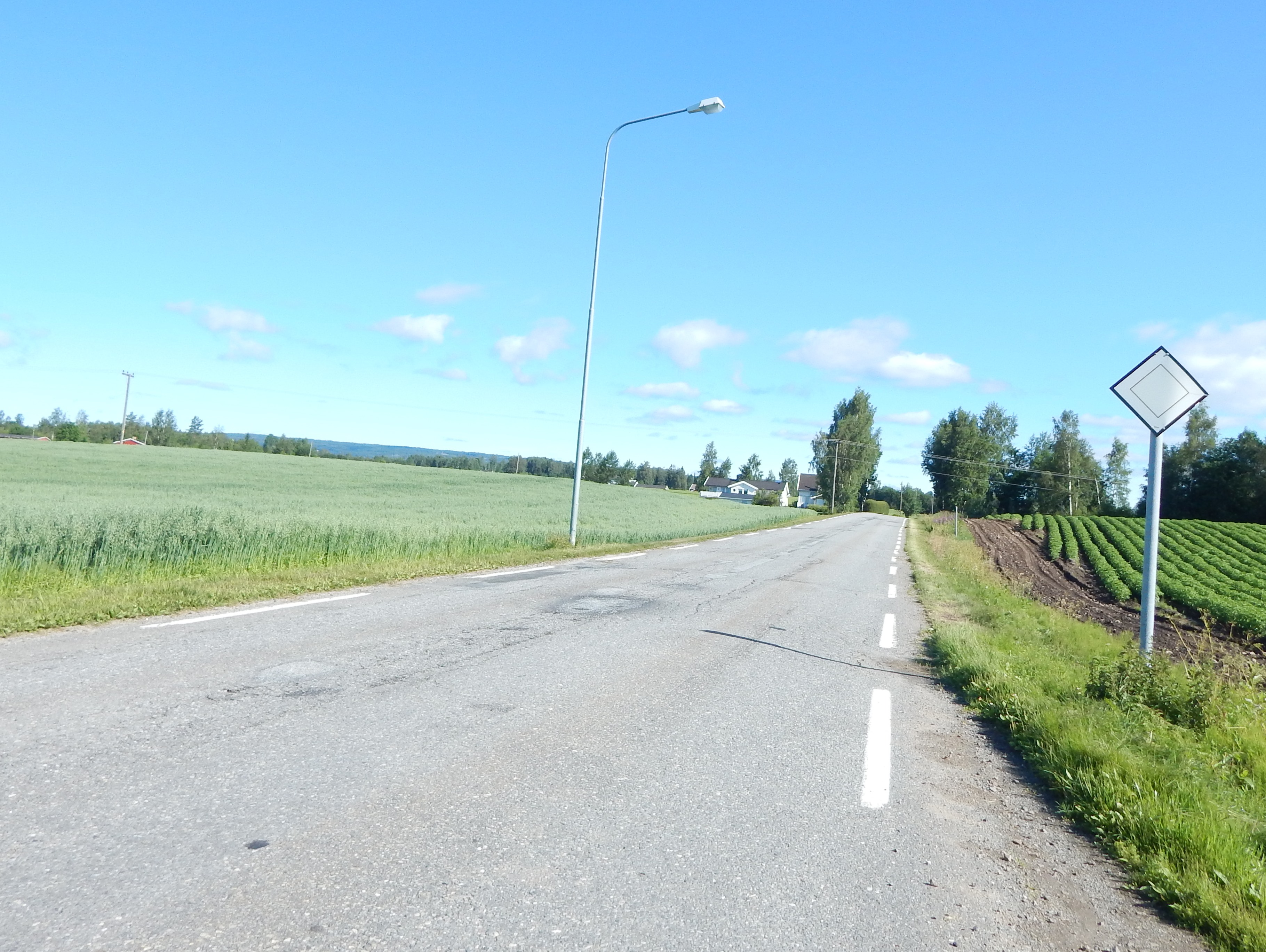 Lageråvegen i Vang